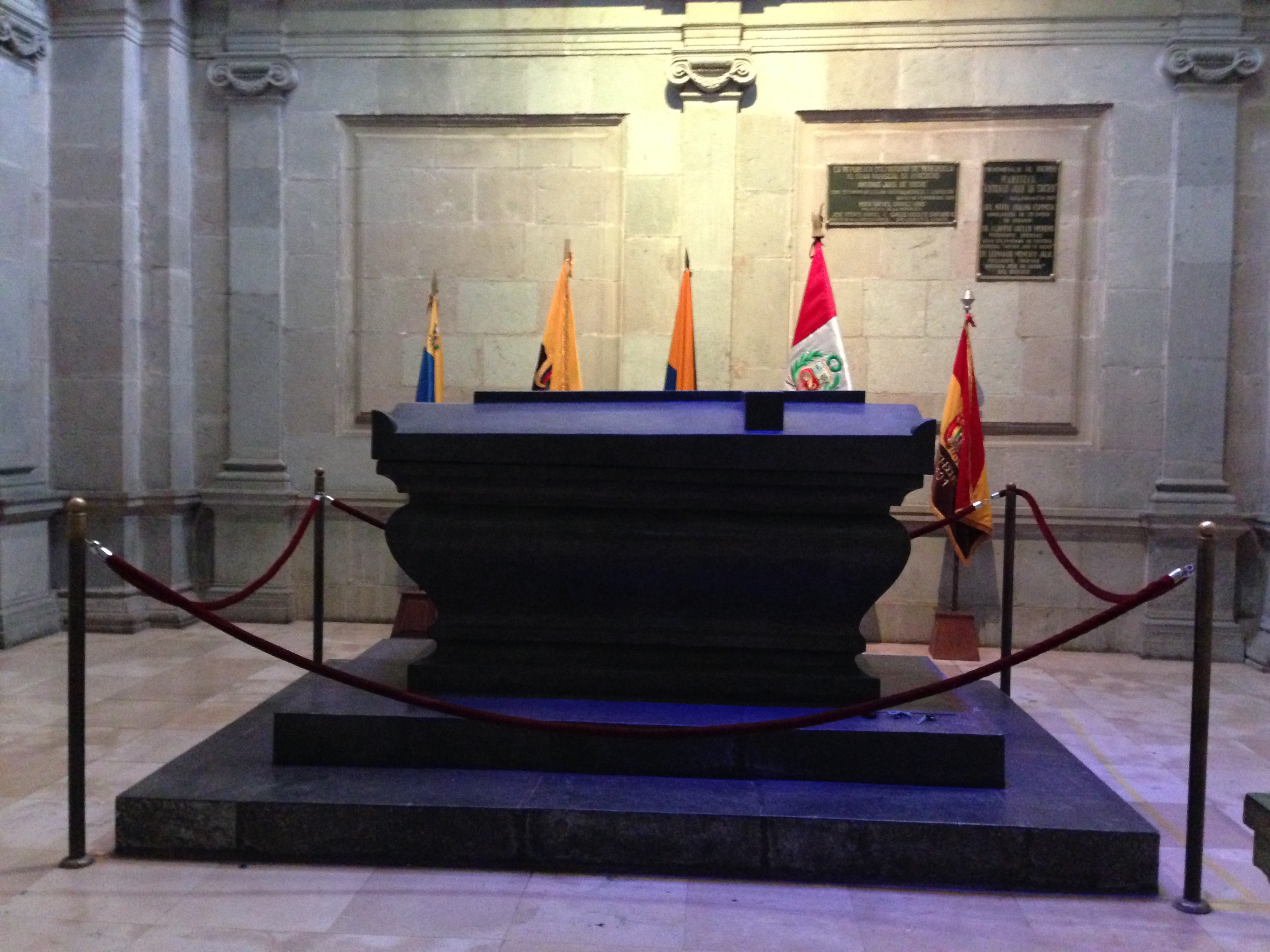 Tumba del Mariscal Antonio José de Sucre en la Catedral Metropolitana de Quito